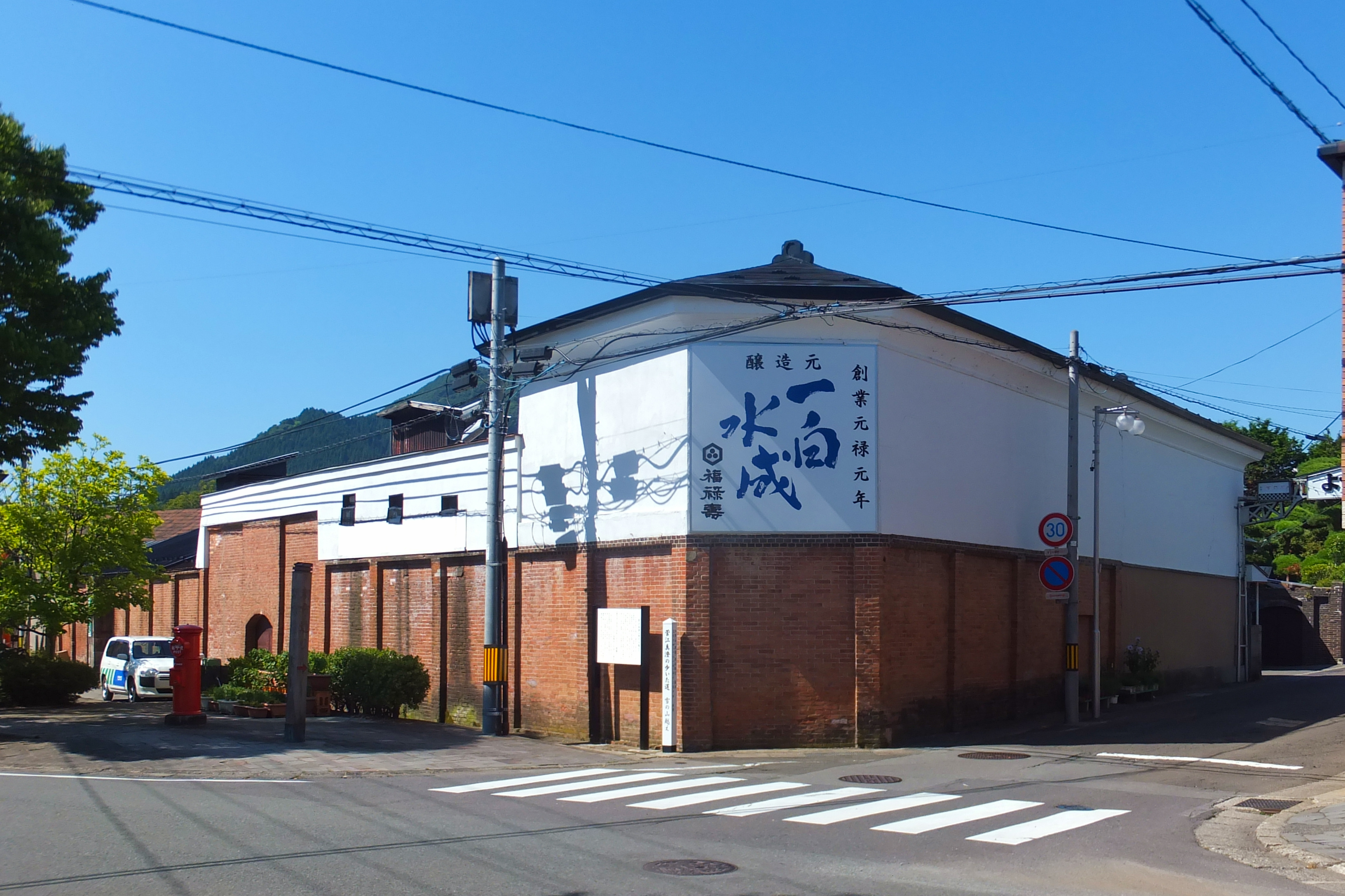 福禄寿酒造（秋田県五城目町）